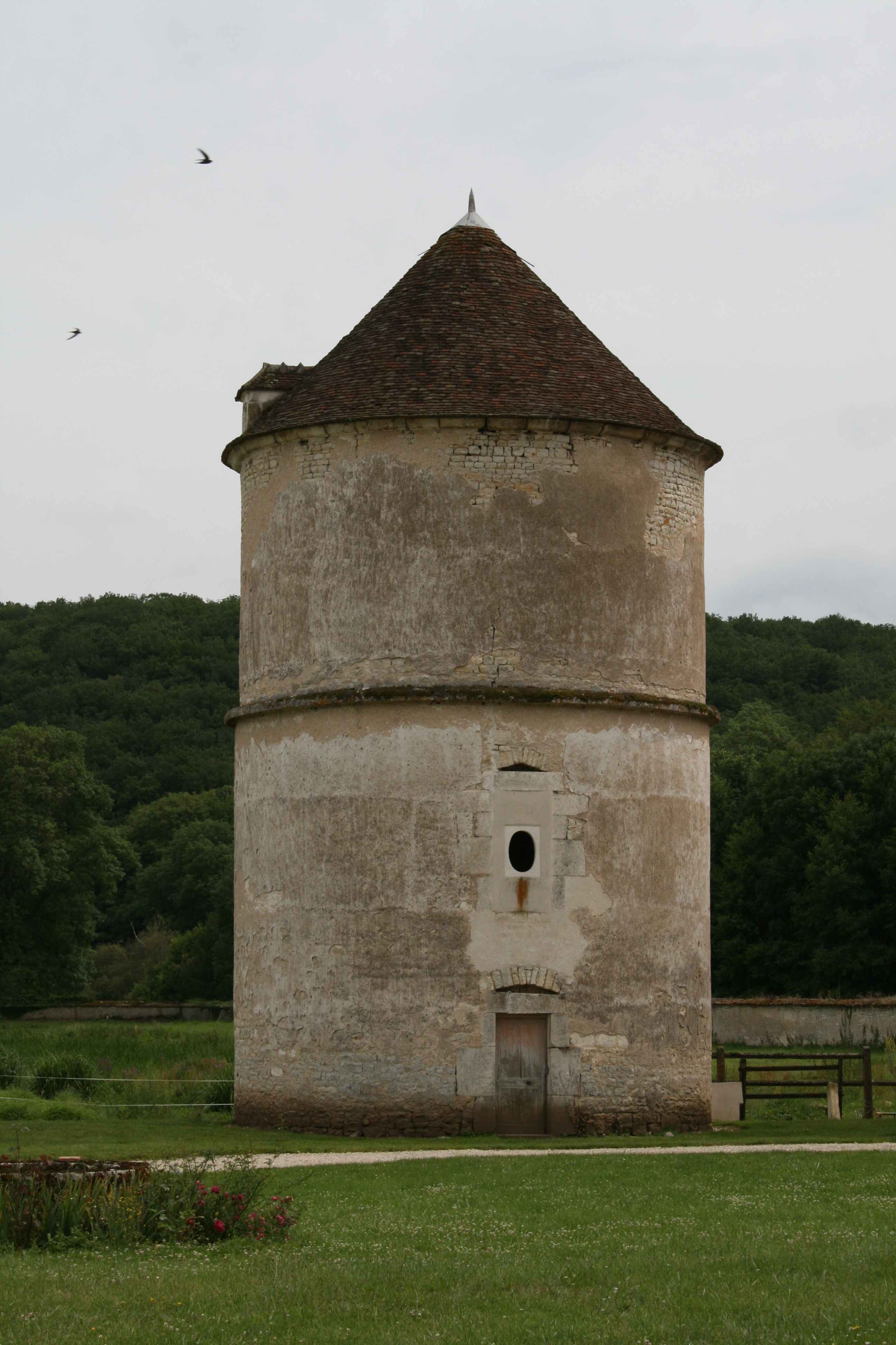 Vermenton Abbaye de Reigny Pigeonnier